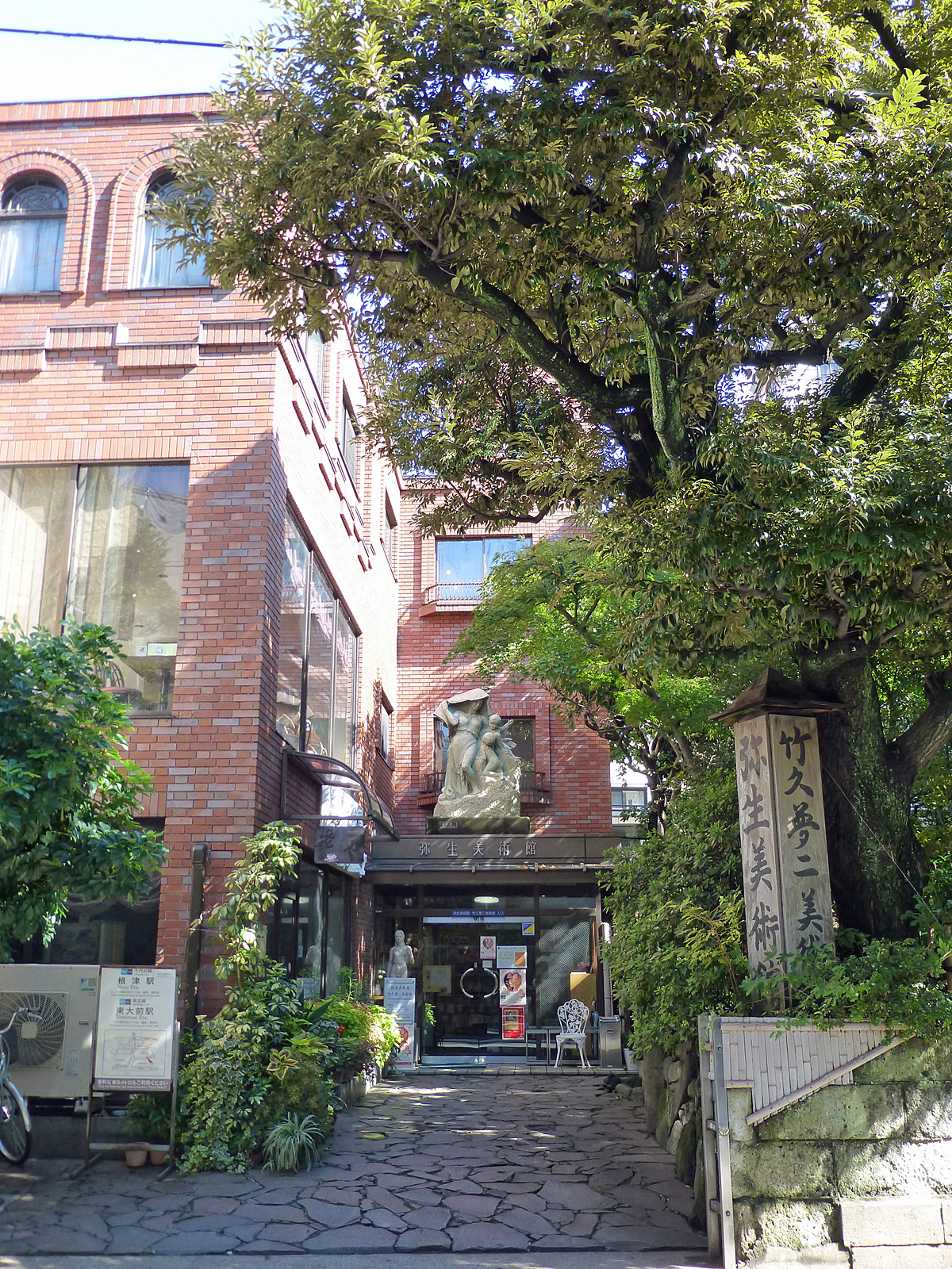 弥生美術館・竹久夢二美術館外観